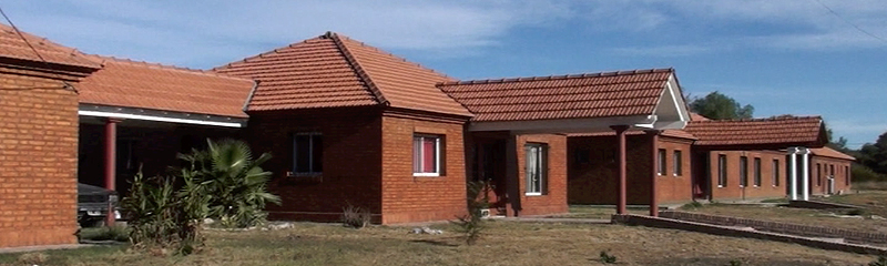 Aldea La Esperanza, de la Fundación Misión Esperanza, presidida por la Hermana Theresa Varela